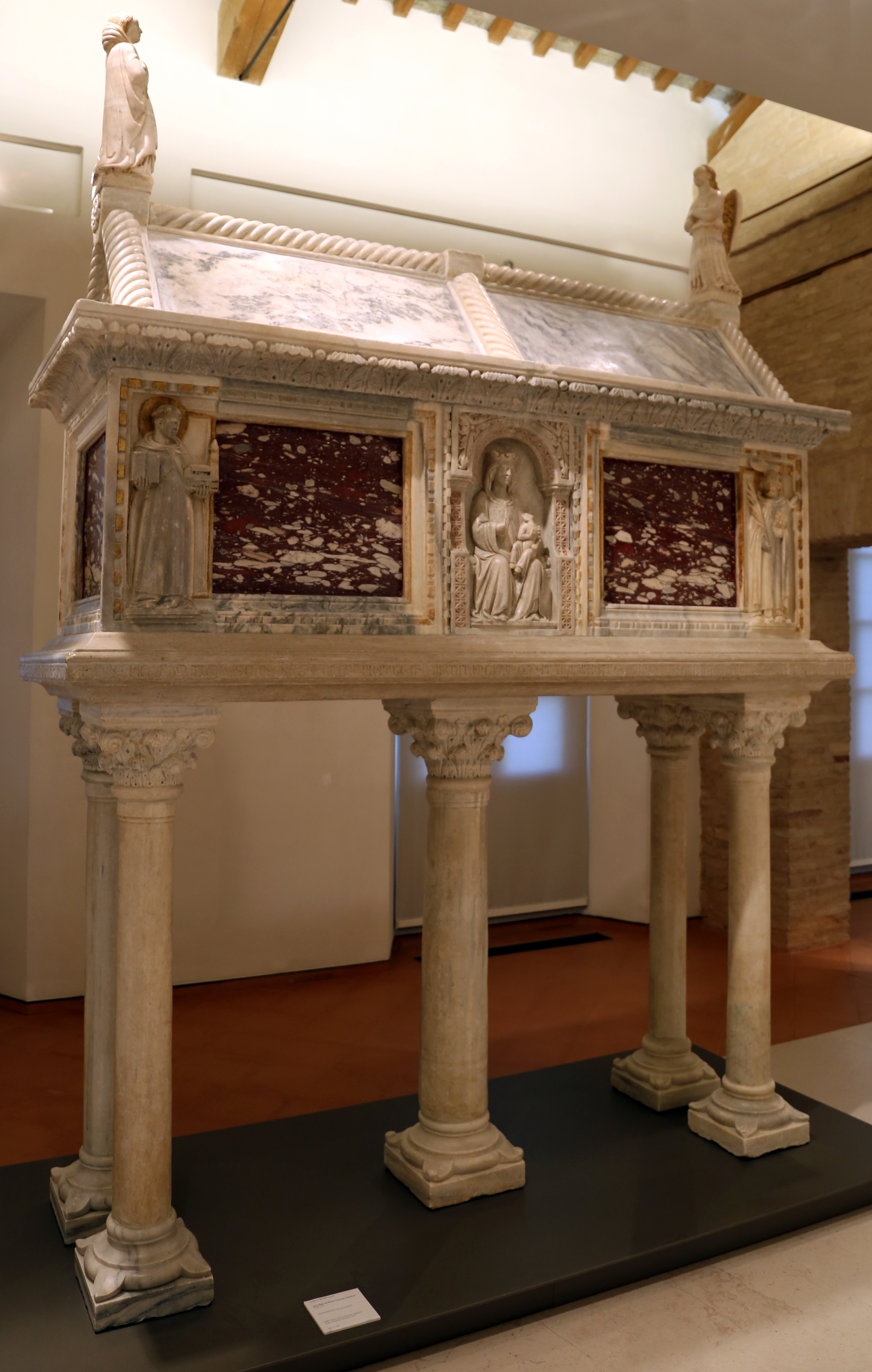 chiesa di San Giacomo Apostolo dei Domenicani This is a photo of a monument which is part of cultural heritage of Italy.